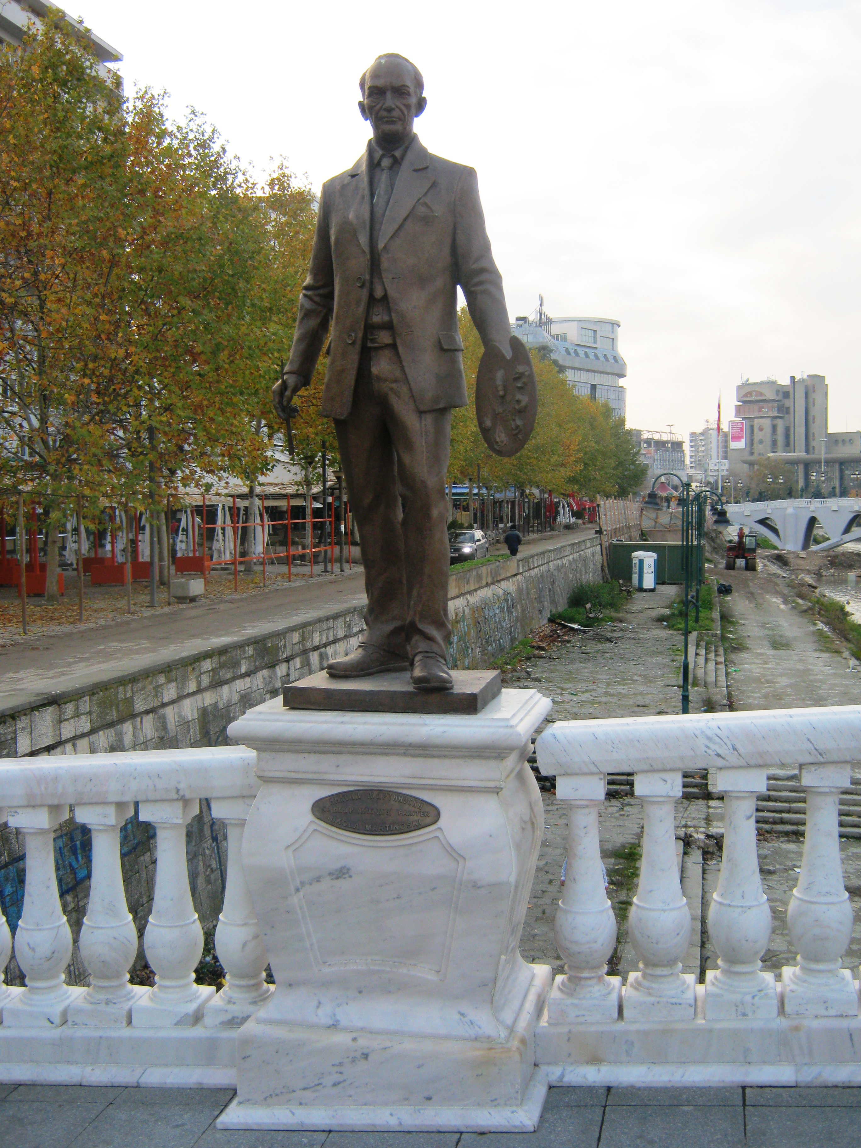 Споменик на Никола Мартиноски на Мостот на уметноста во Скопје